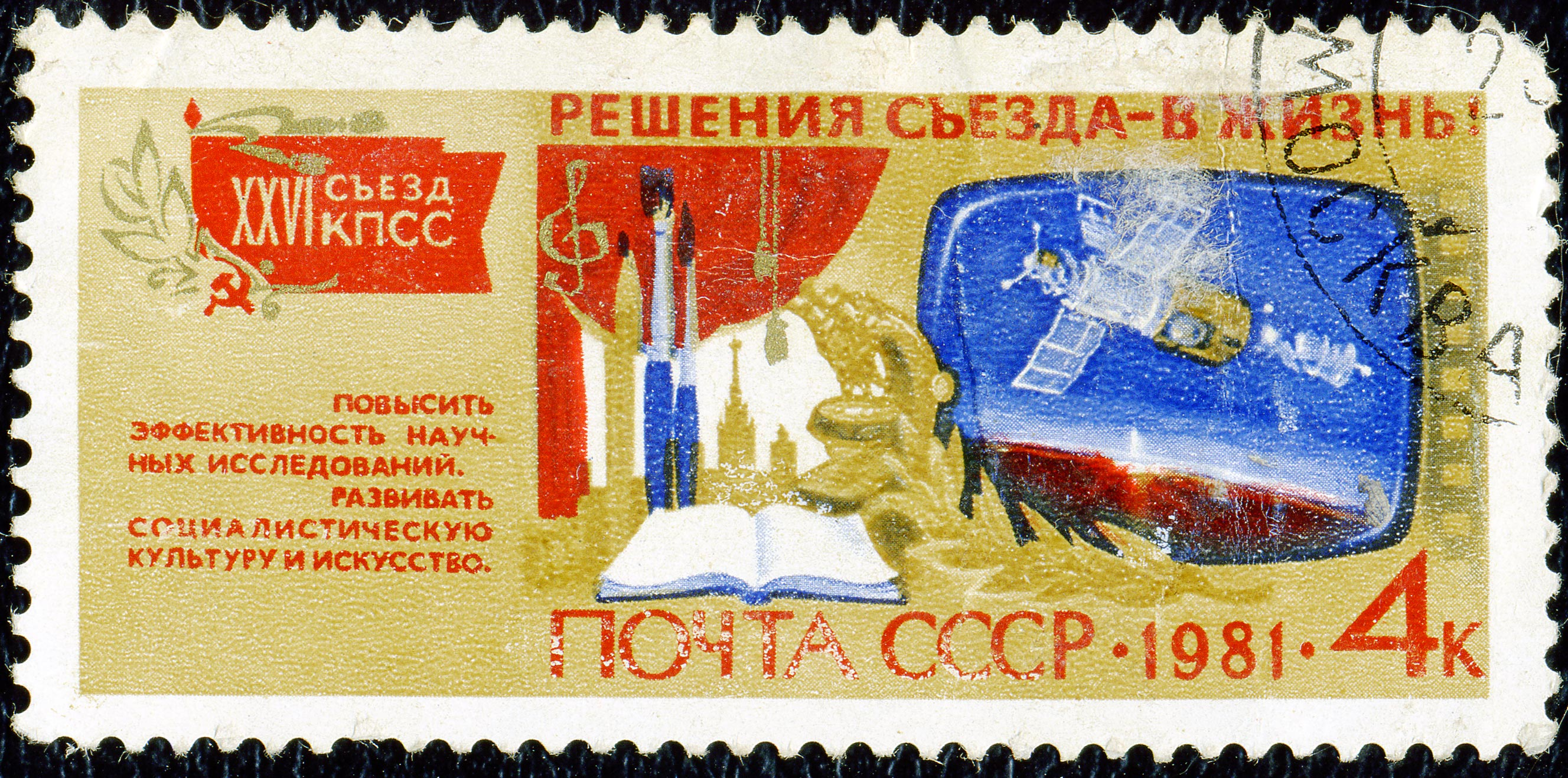 Почтовая марка СССР. 1981. XXVI съезд КПСС